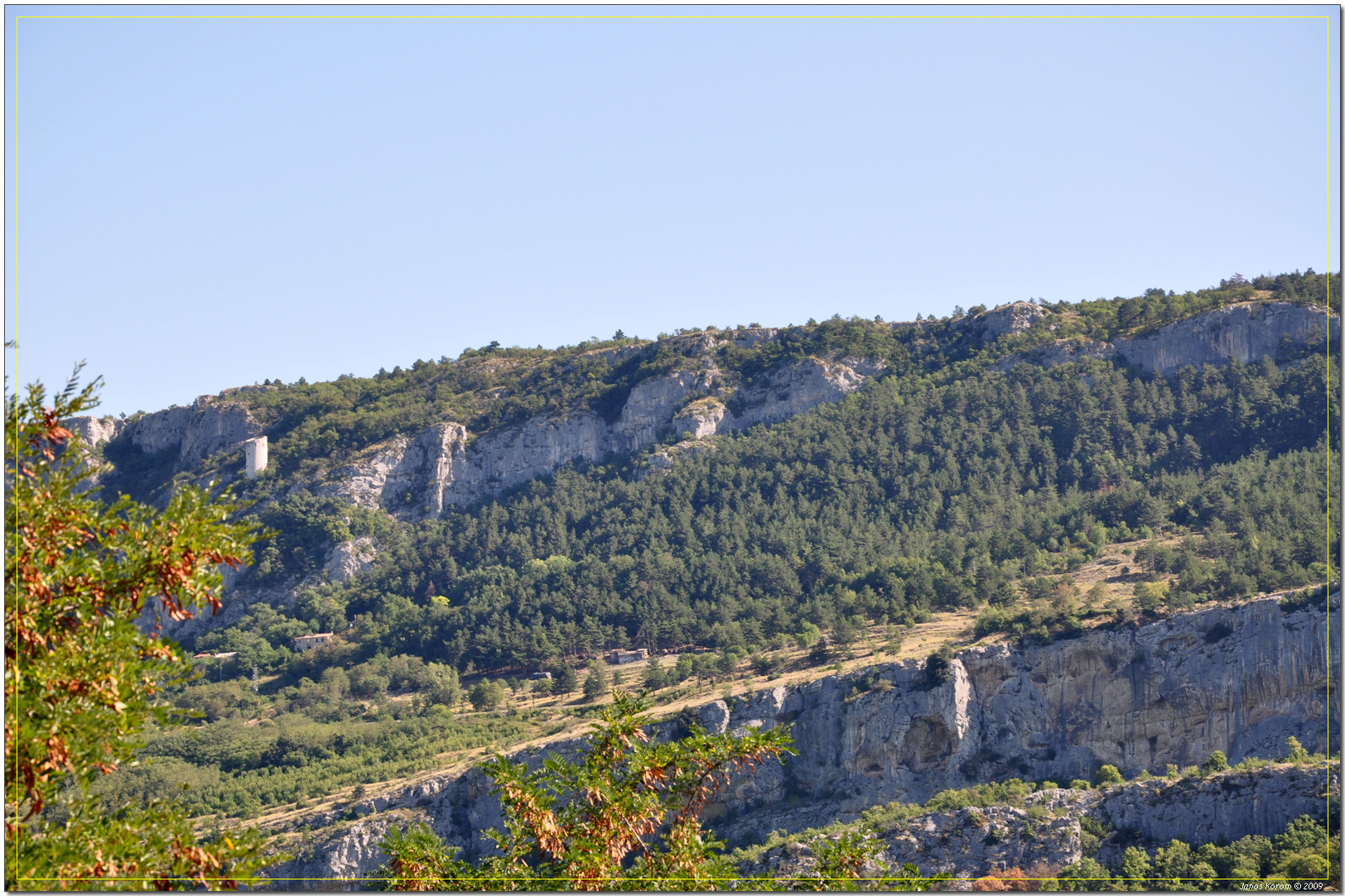 Hrastovlje (1)